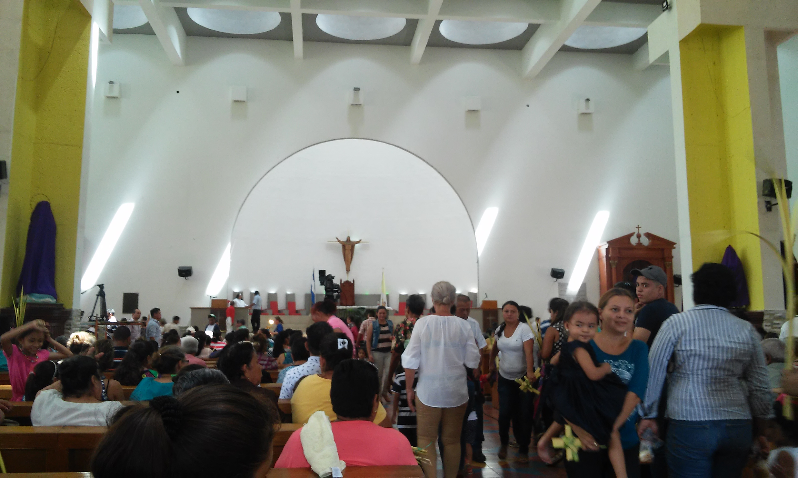 El interior de la Catedral Metropolitana de Managua el Domingo de Ramos de 2017, antes de la Misa.